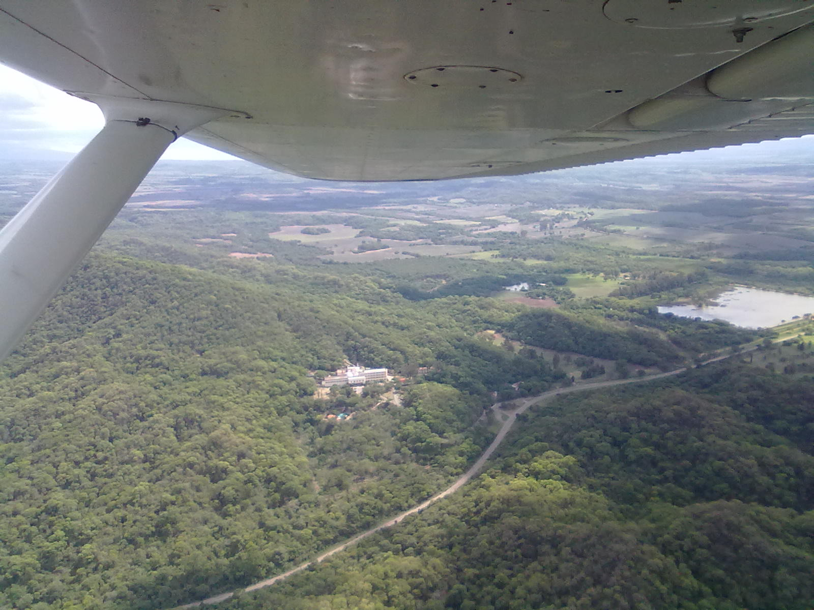 Hotel Termas en vista aérea.